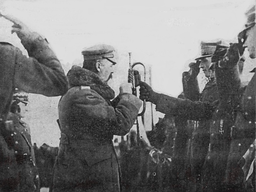 Dekoracja trąbki 14 pal w dniu 6 grudnia 1920 r. przez Naczelnego Wodza marszałka Józefa Piłsudskiego na polach Zelwy